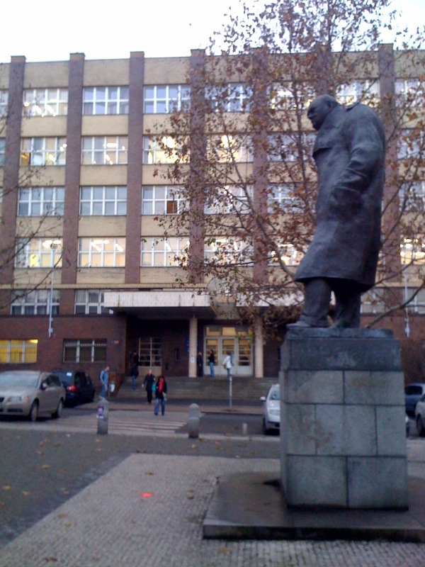 Stará budova VŠE z náměstí Winstona Churchilla